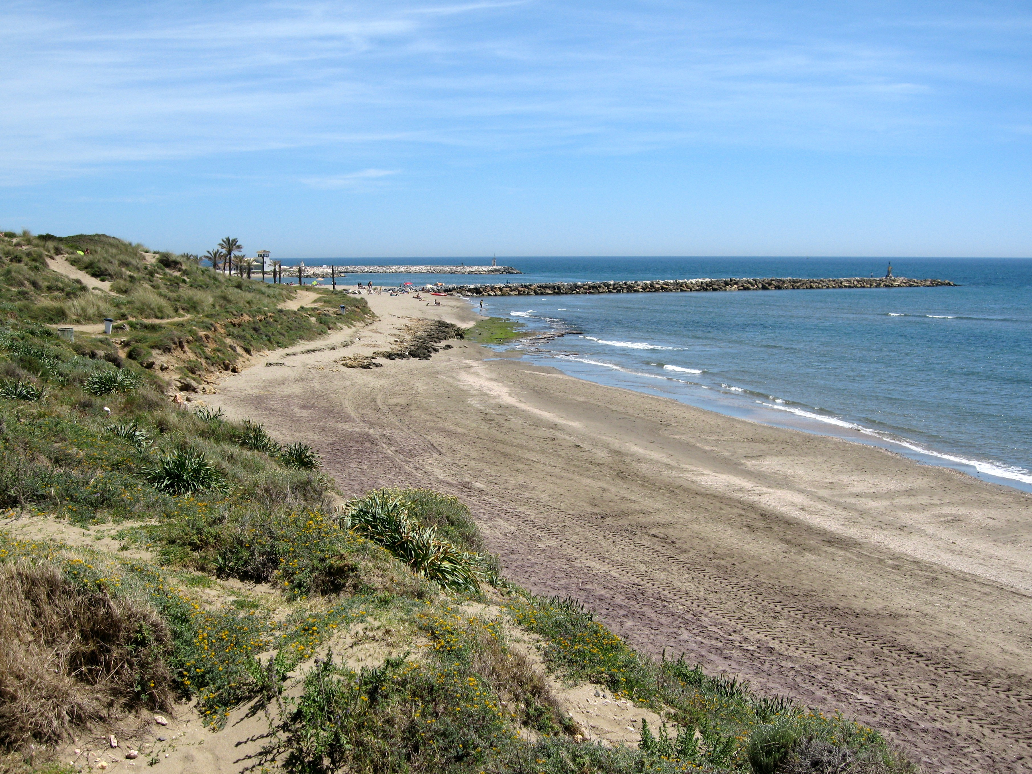 Strand von Cabopino, Ortsteil von Marbella, Provinz Málaga, Andalusien, Spanien